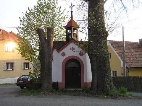 kaplička v Týništi